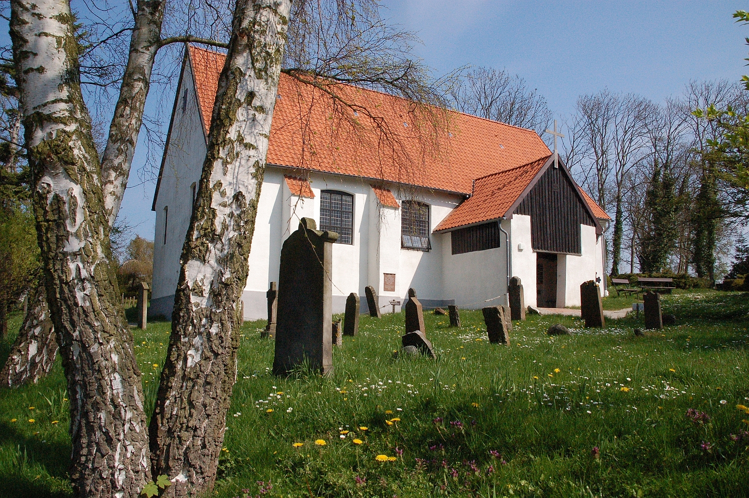 Außenansicht der Hiddenseer Inselkirche